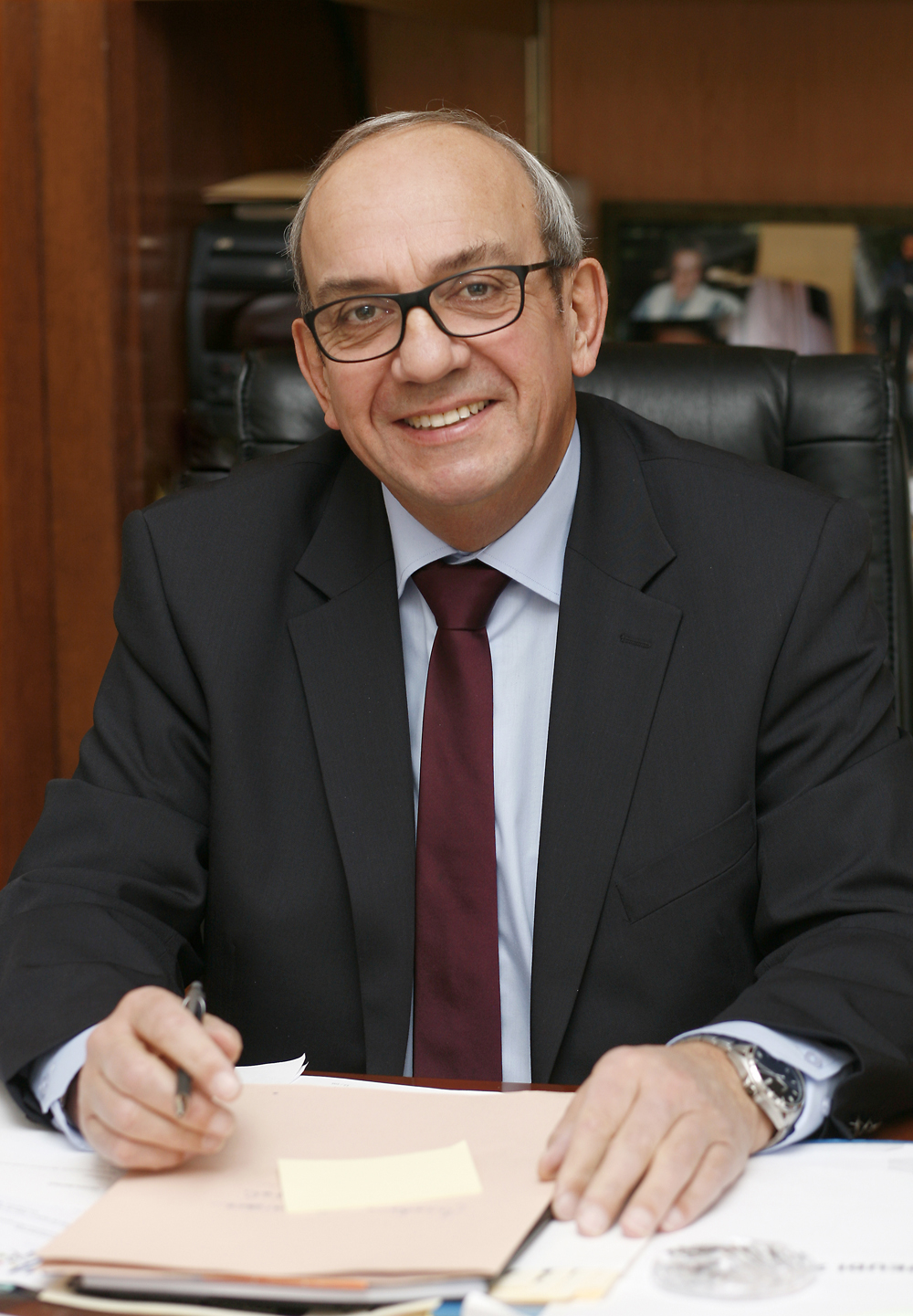 Fabien thiémé. Octobre 2015